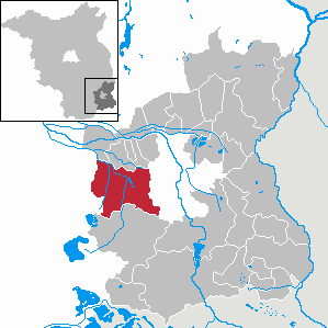 Kolkwitz in Brandenburg (Country) - District Spree-Neiße